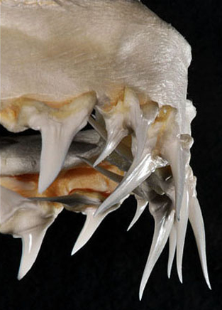 Isurus paucus